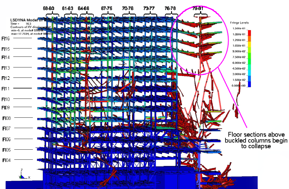 Визуализация NIST коллапса WTC 7